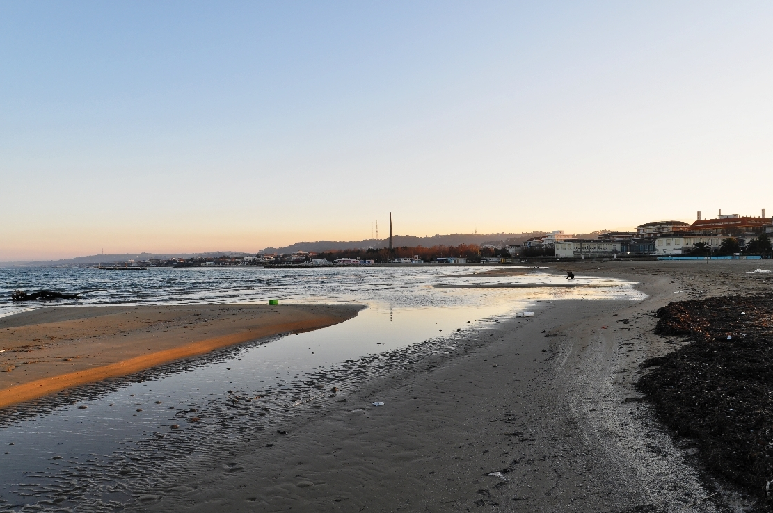 Am Stand Pescara Dez 2013